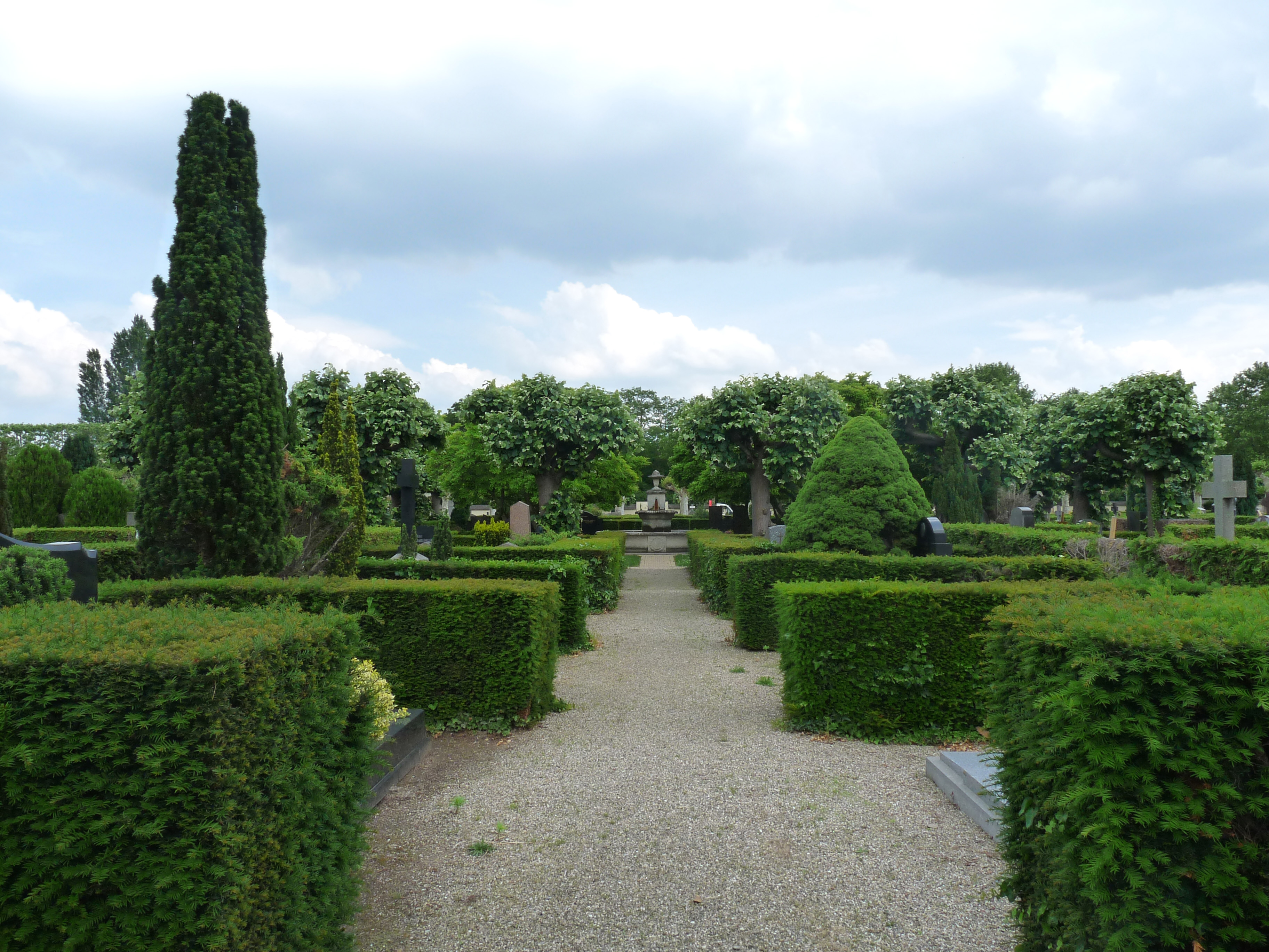 Cimetière Nord de Strasbourg. Jardins à la française.